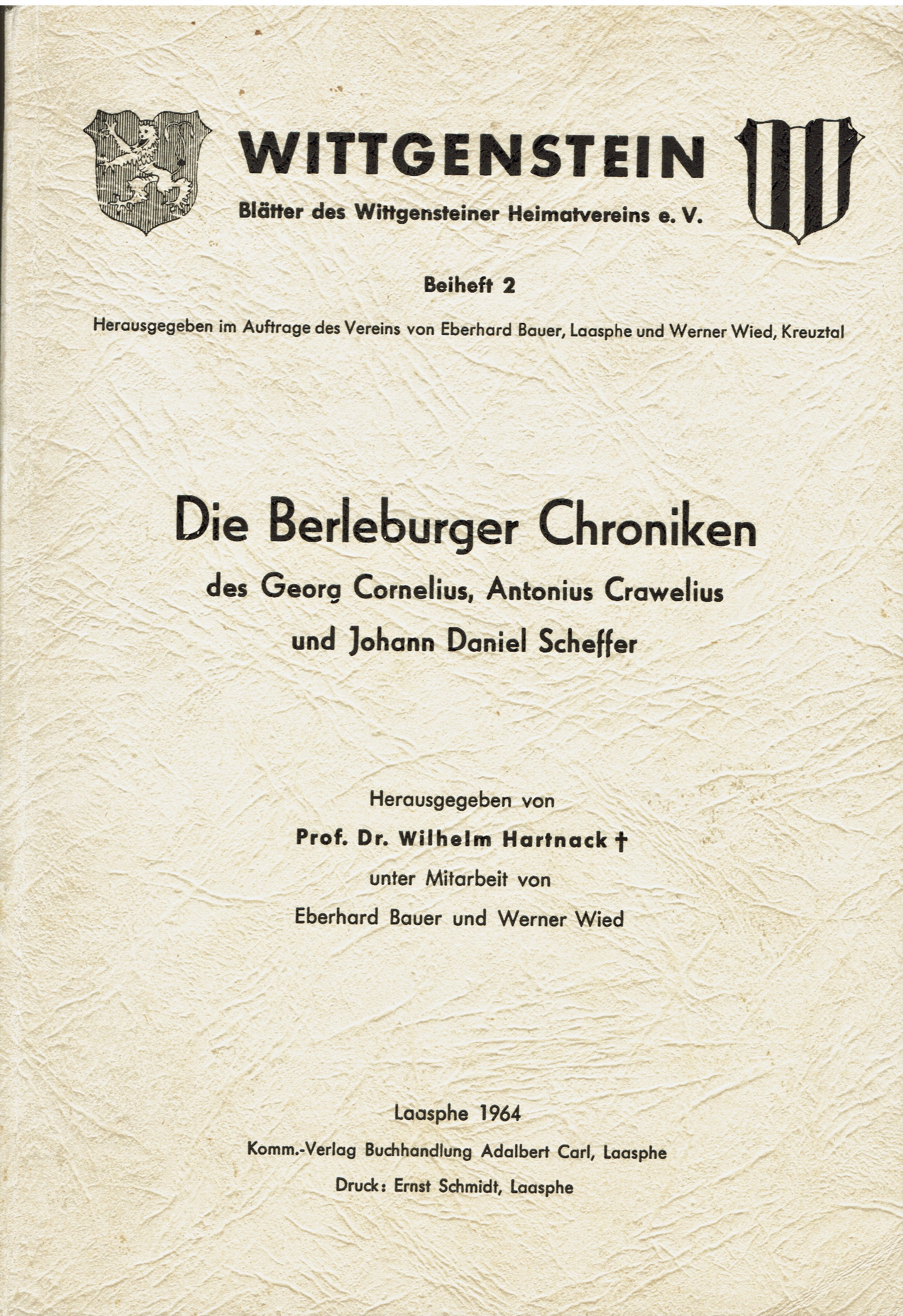 Buchtitel, Deckblatt Die Berleburger Chroniken 1964